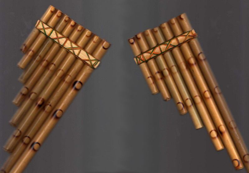 Siku bipolar típico fabricado en Bolivia, separado para ser ejecutado por dos músicos. El de la izquierda es el amarro Arka, y el de la derecha el amarro Ira.